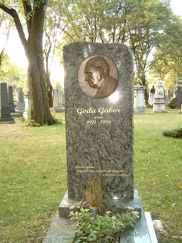 Goda Gábor sírja Budapesten. Kerepesi temető: 34/1-1-41.